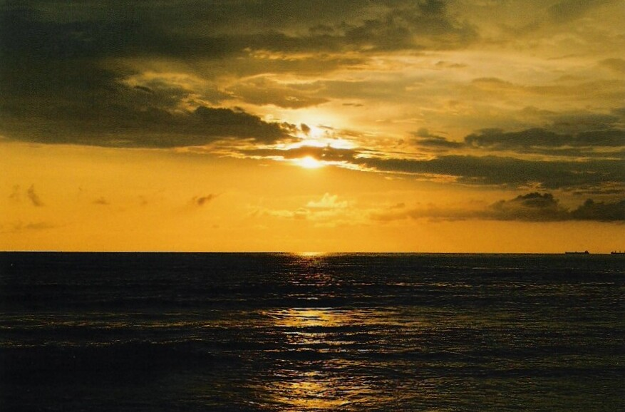 Panambur Beach, Mangalore